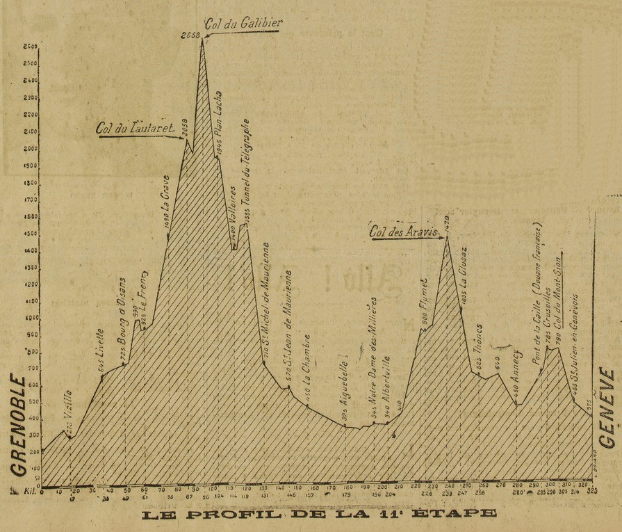 Tour de France 1919. Profil 11e étape